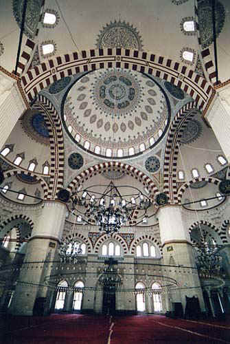 Mimar Sinan - Mosquée Şehzade Mehmet, Istanbul Auteur : Oscar J. Marianez